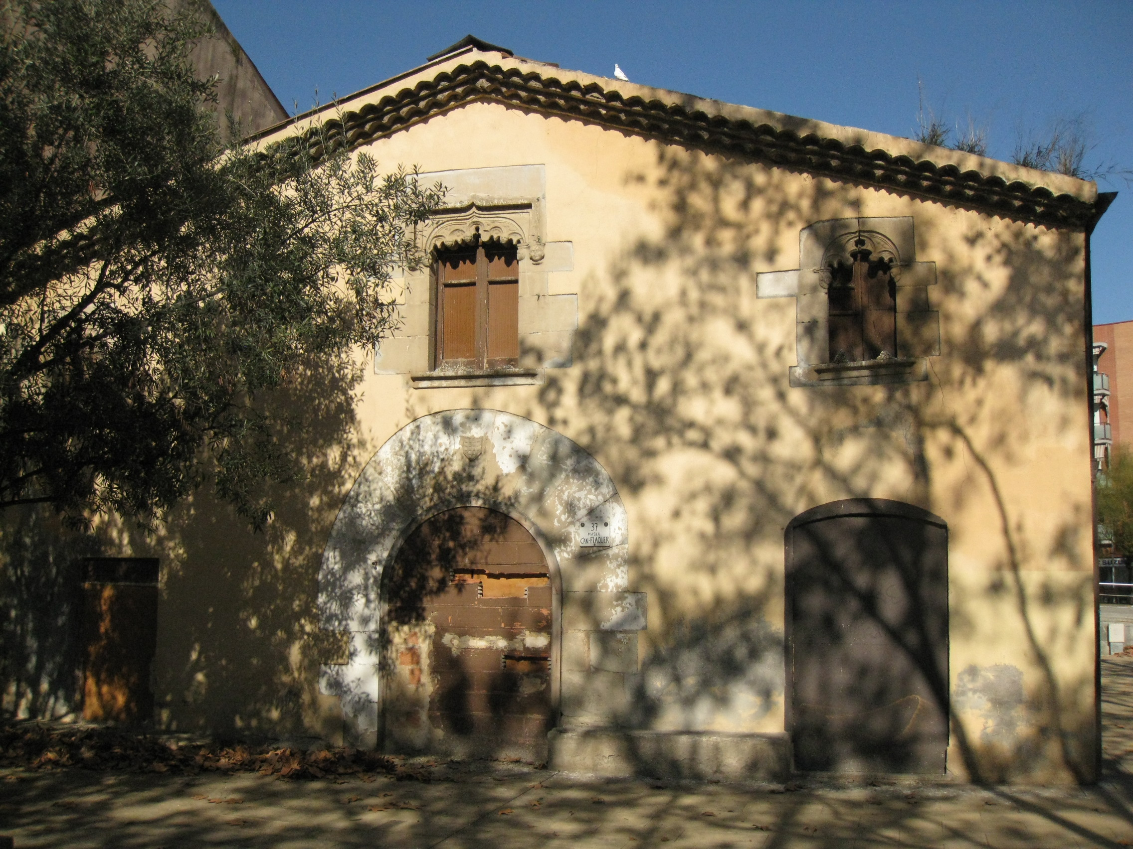 Conjunt de Can Flequer i Can Pantiquet (Mollet del Vallès)